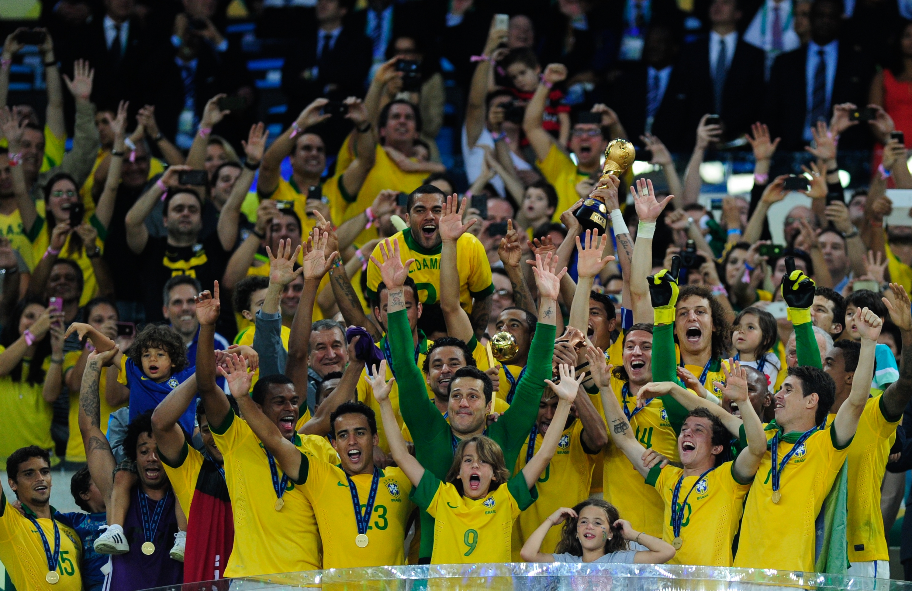 No Estádio do Maracanã, Brasil e Espanha disputam a taça da Copa das Confederações de 2013.